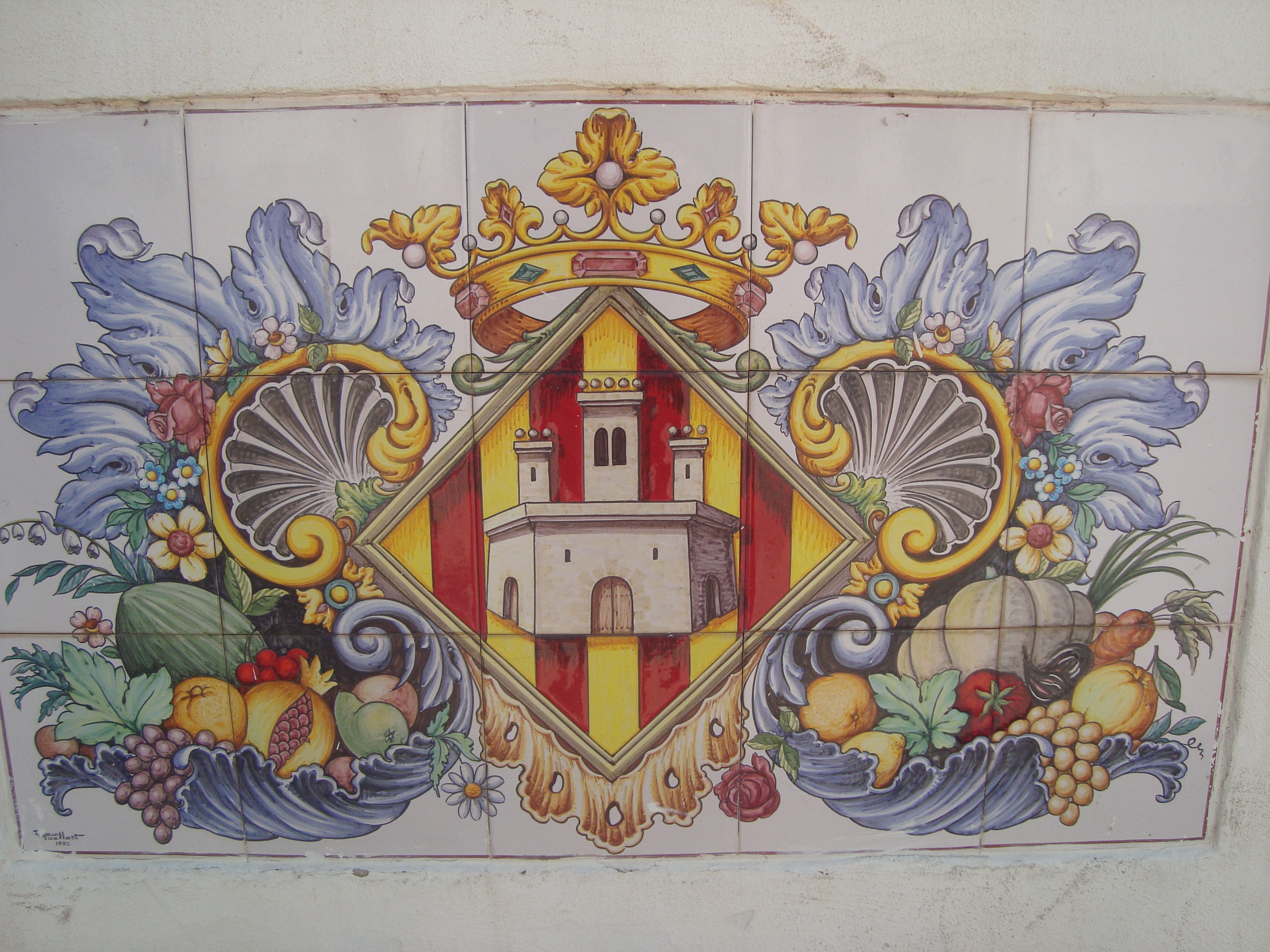 Escudo de Castellón de la Plana, mural cerámico